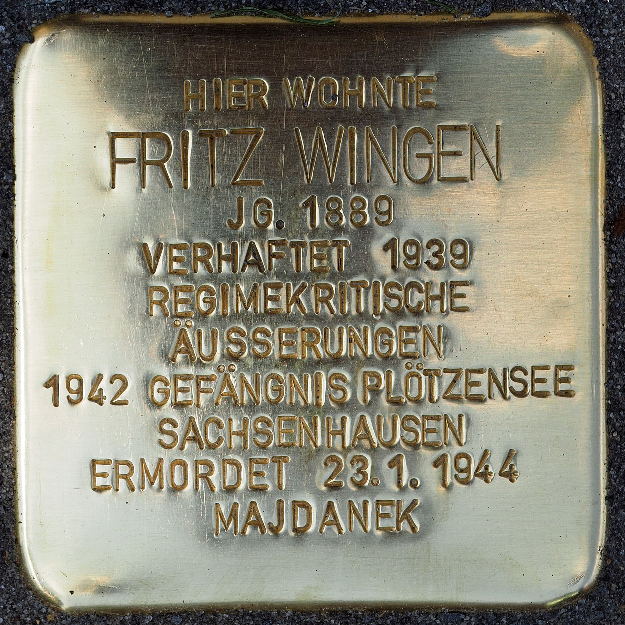 Stolpersteine Kempen: Wingen, Fritz